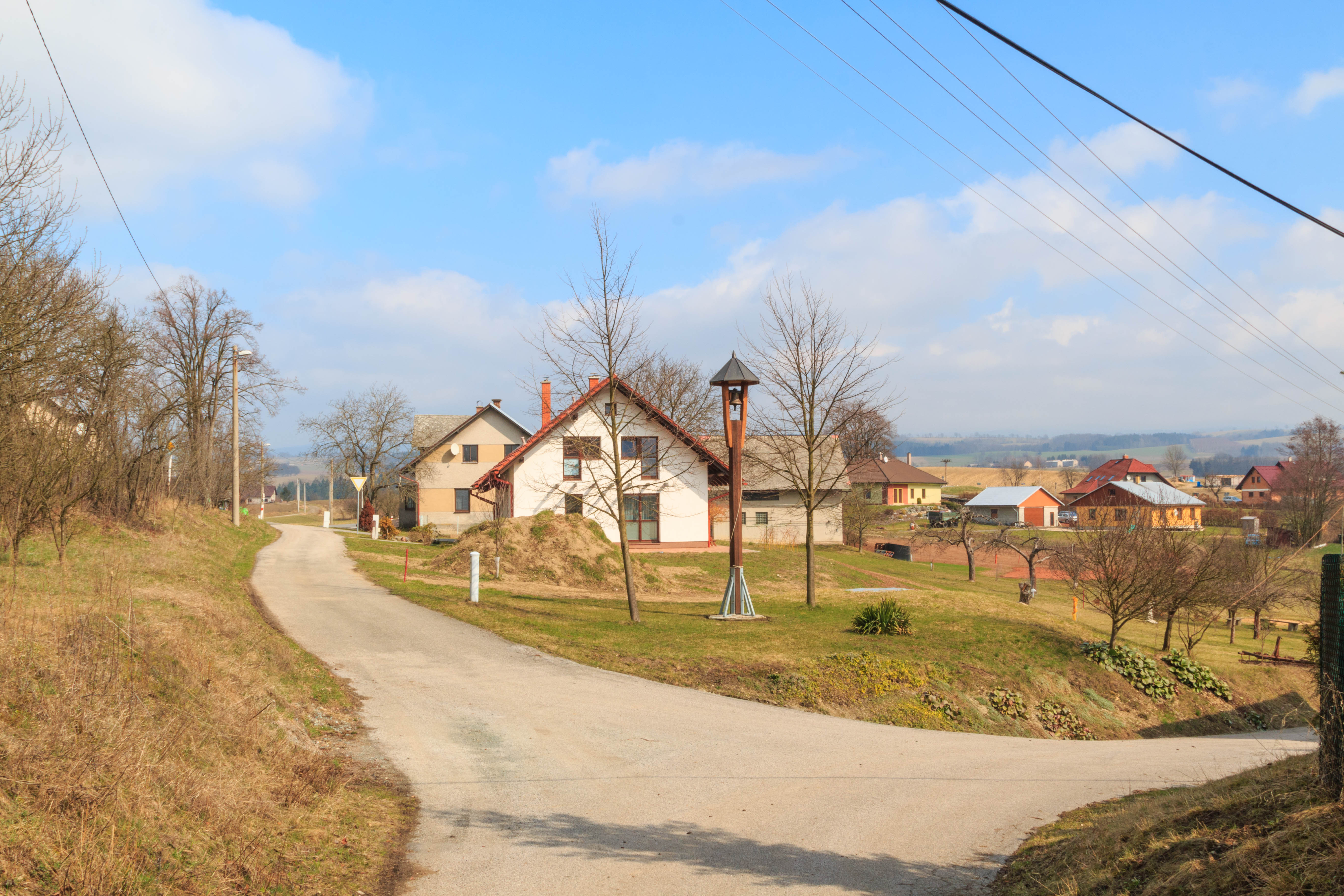 Jaroslav - zvonička